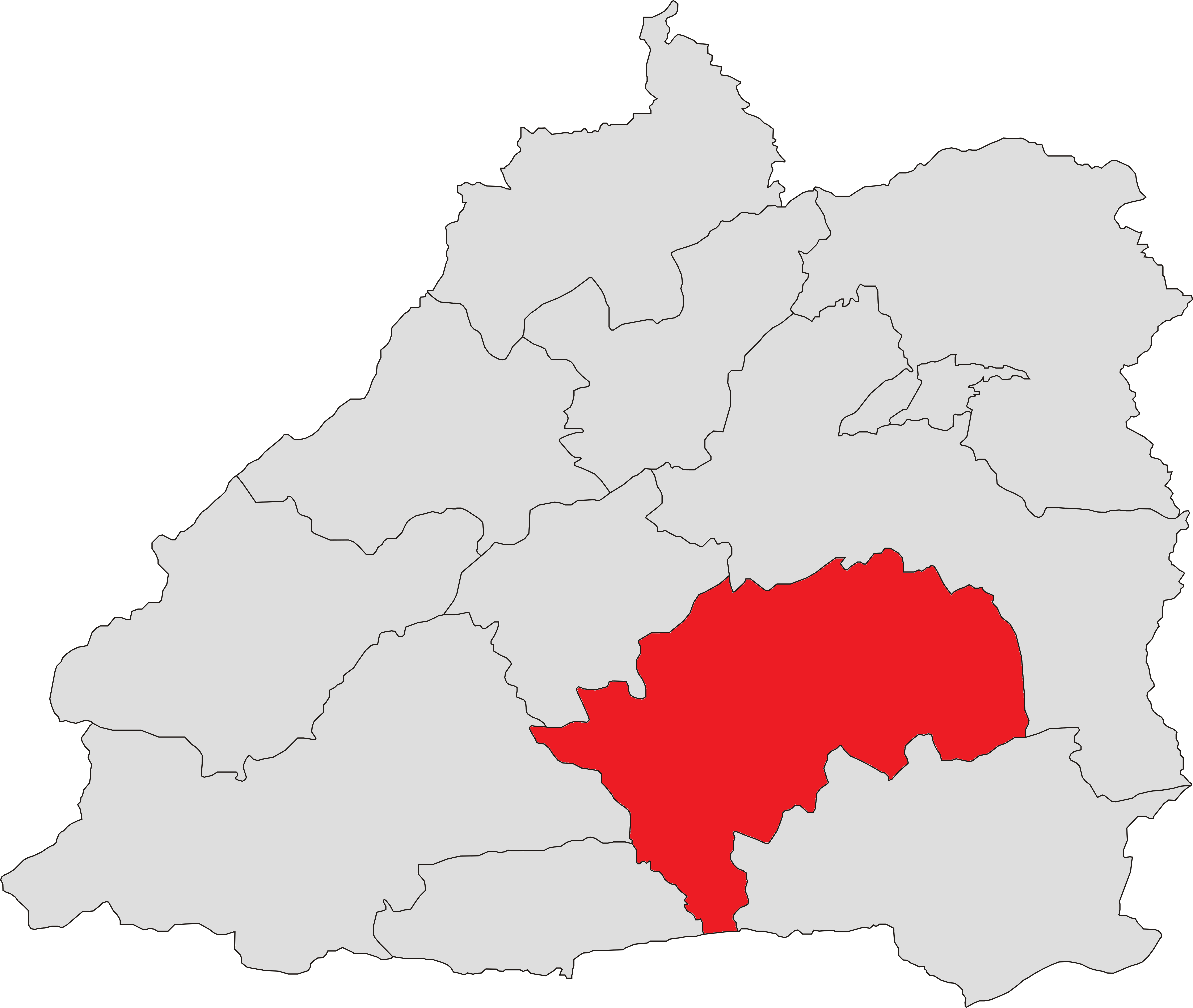 中文（中国大陆）: 芒市勐戛镇位置图